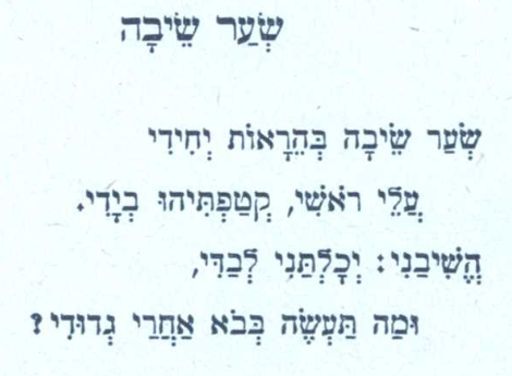 מכתם מאת ר' יהודה הלוי